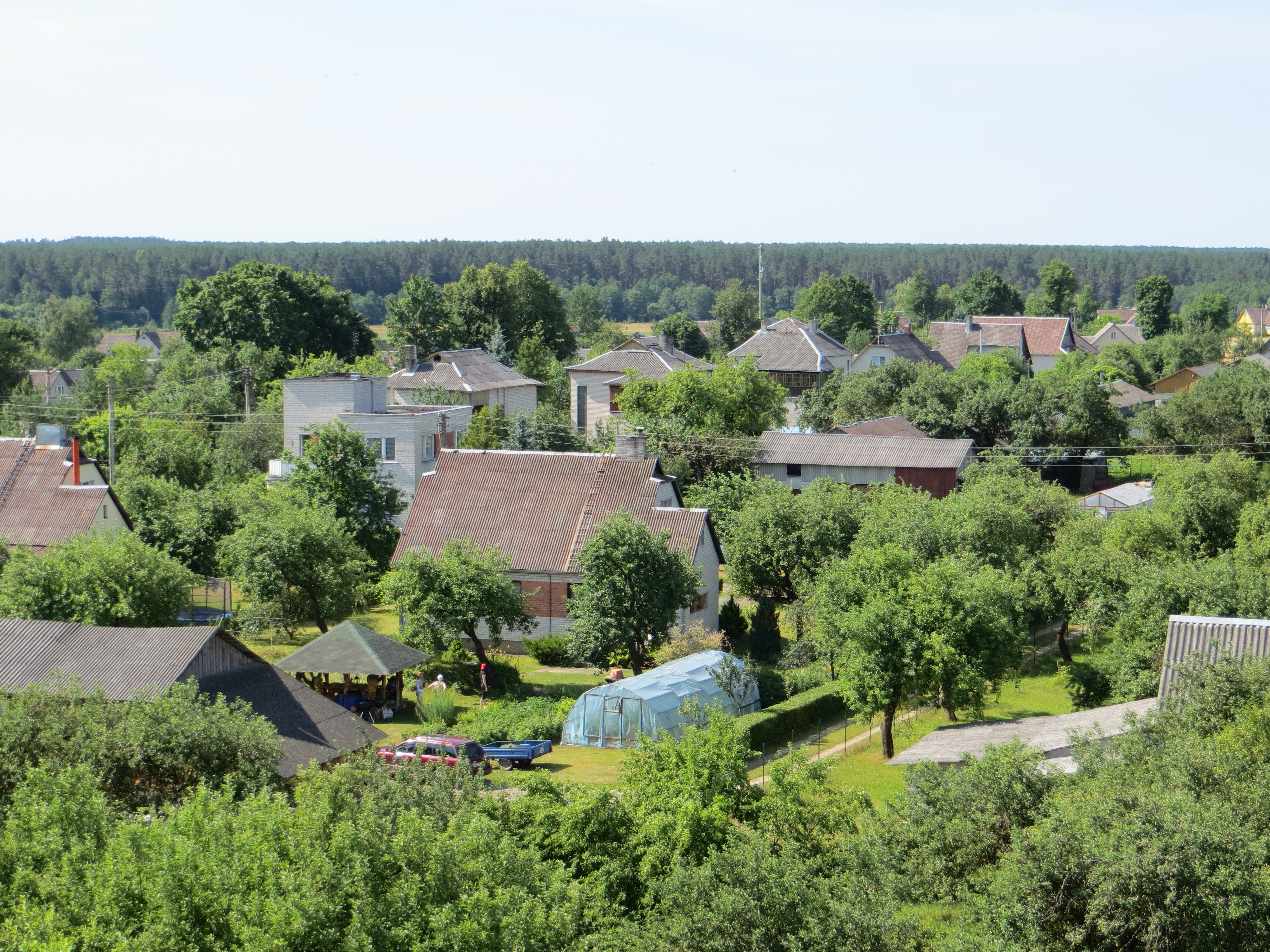 Perloja, Lithuania